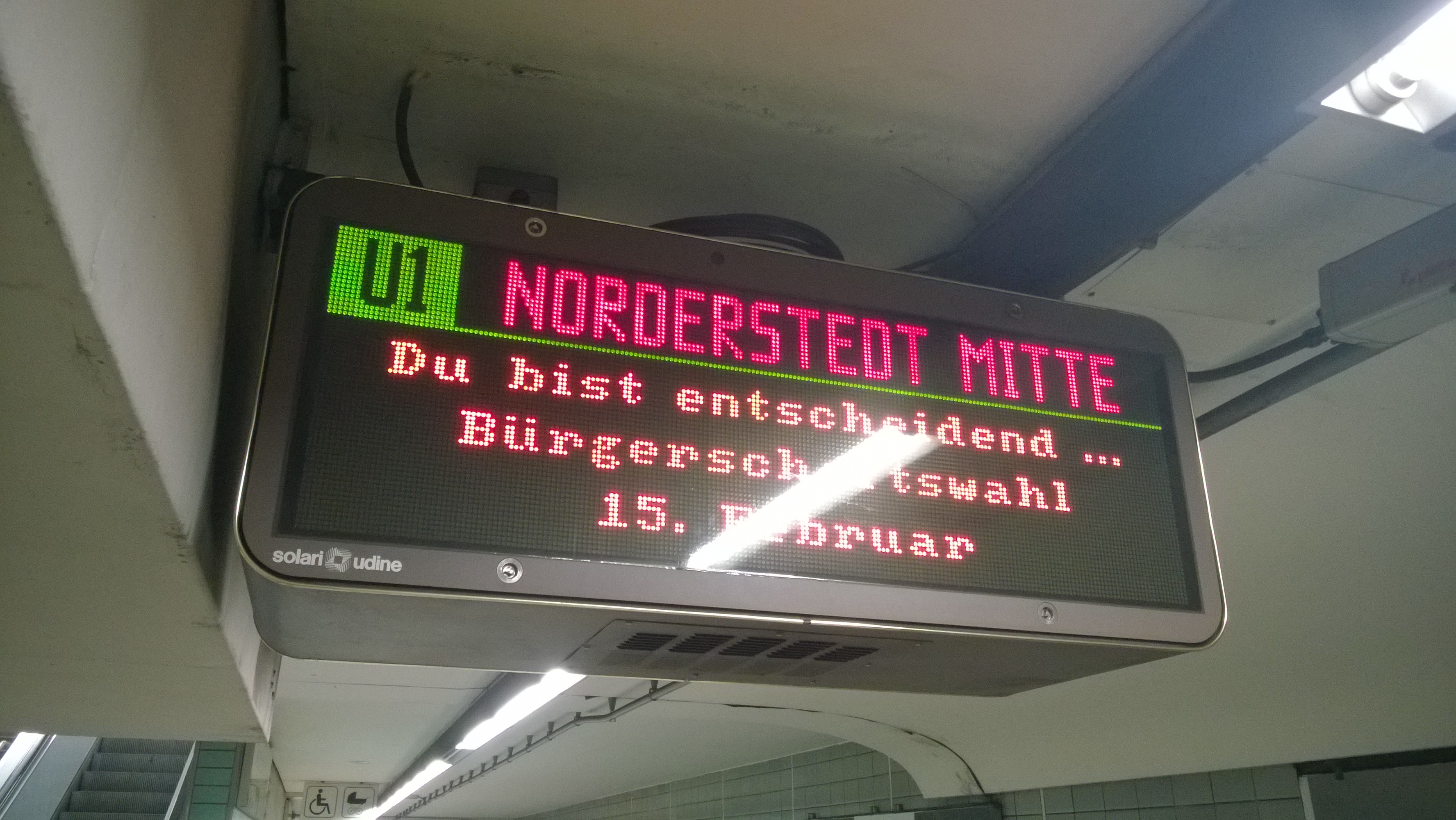 Aufruf zu Bürgerschaftswahl in Hamburg 2015 auf allen Zugzielanzeigen der Hamburger U-Bahnen. Dieses Bild wurde in der Haltestelle Hauptbahnhof Süd aufgenommen.